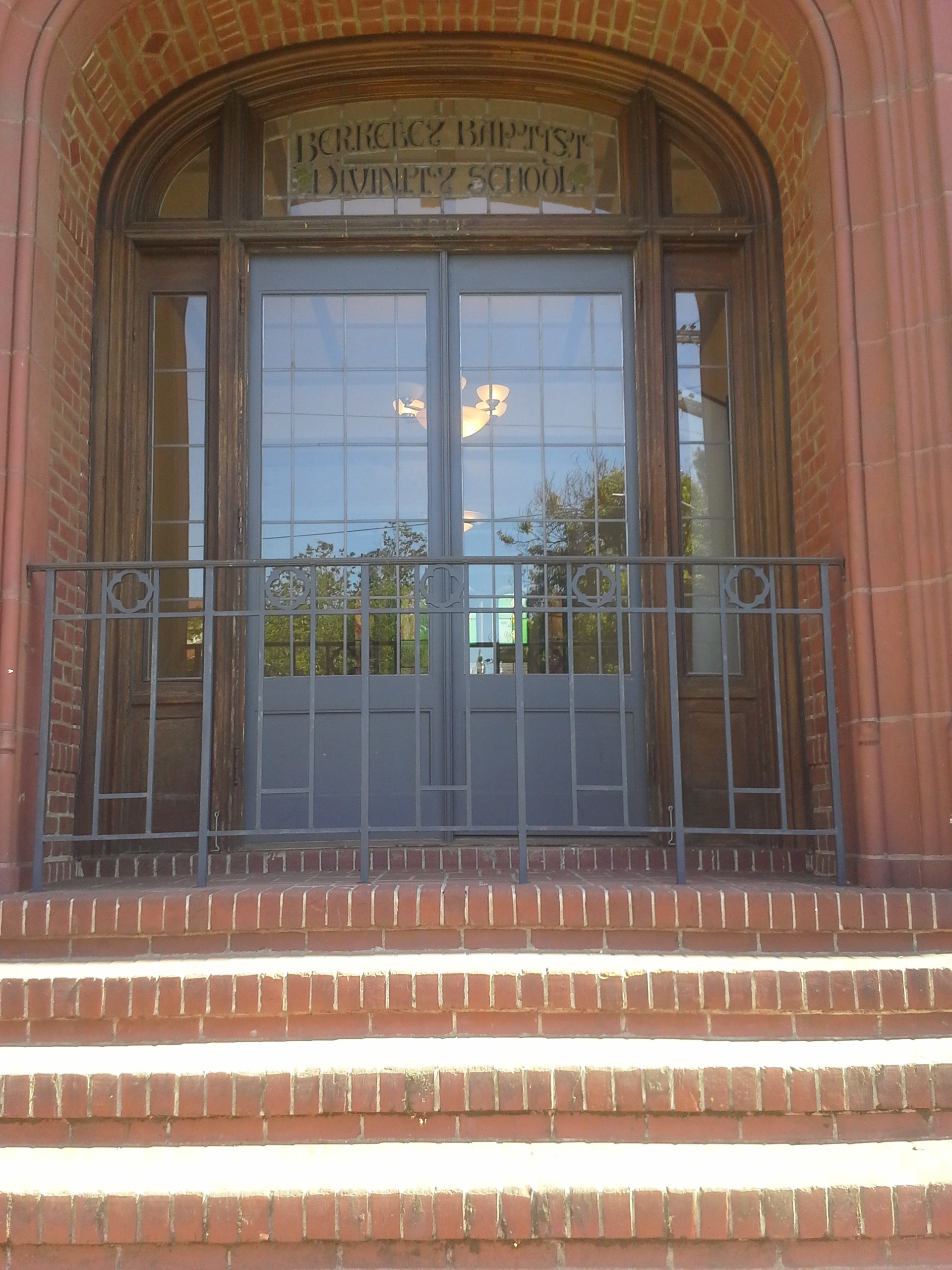 Iama ĉefpordo (nun balkoneto) ĉe American Baptist Seminary of the West en Berklio